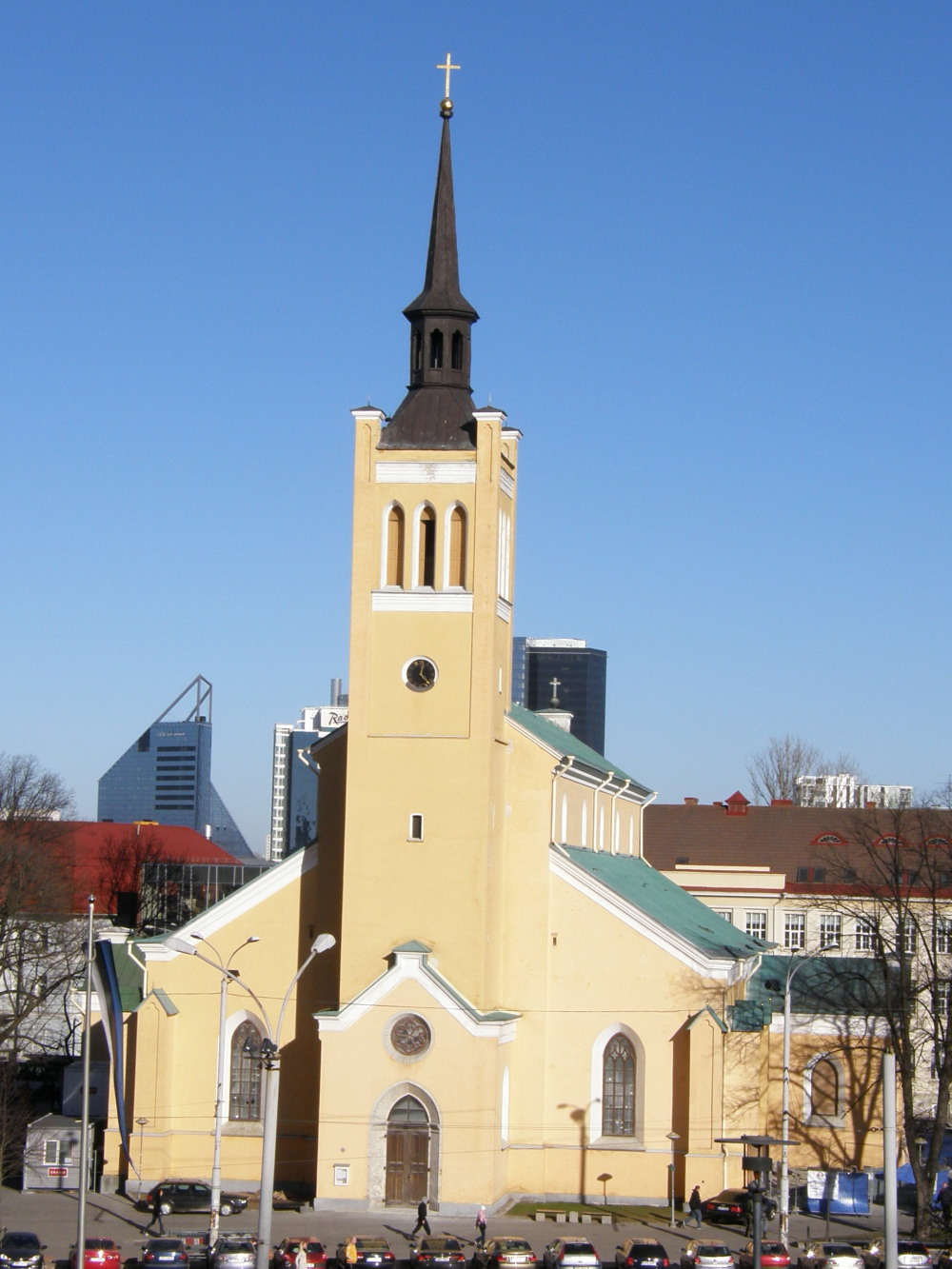 Jaani kirik